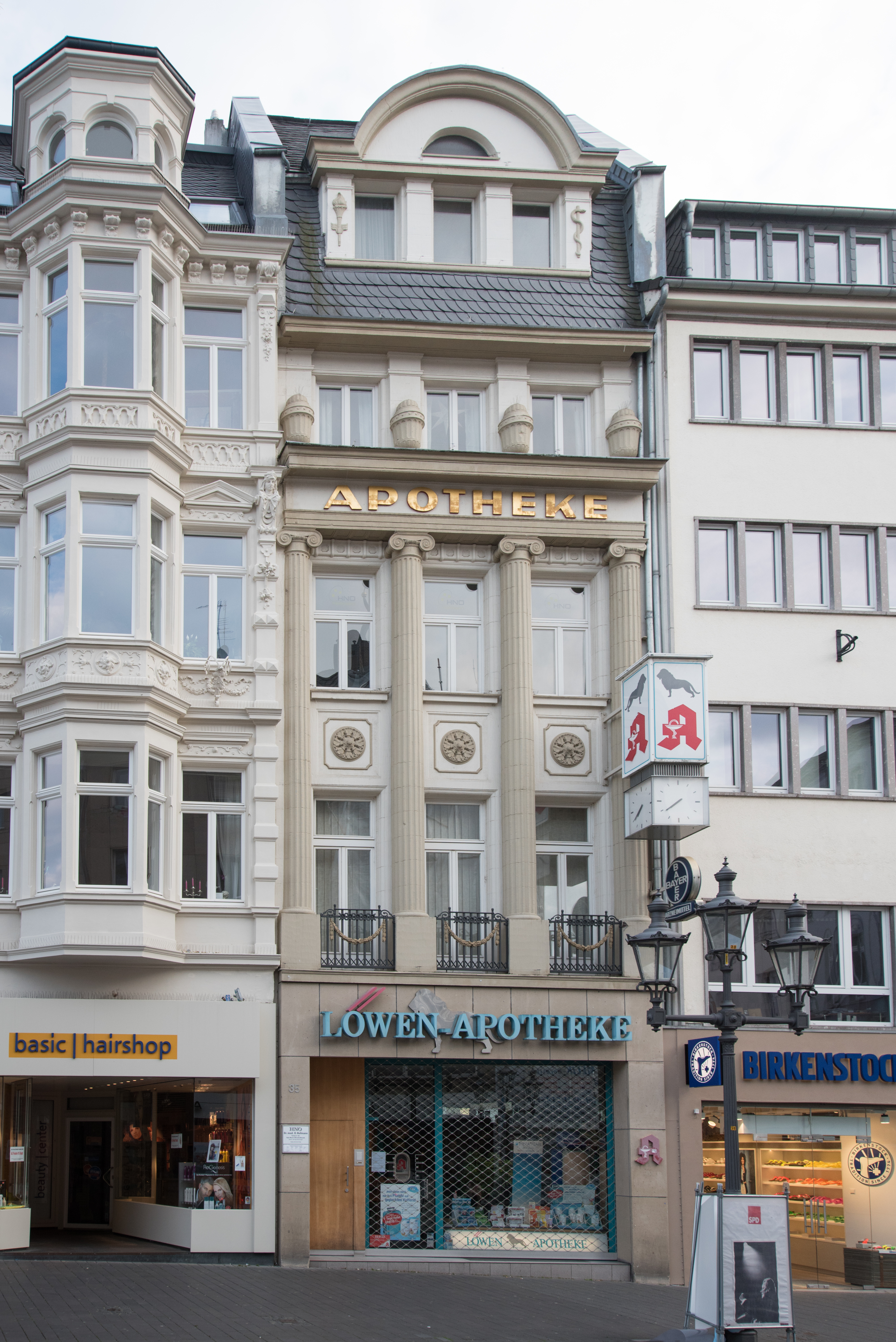 Denkmalgeschütztes Wohn- und Geschäftshaus, Markt 35, Bonn-Zentrum